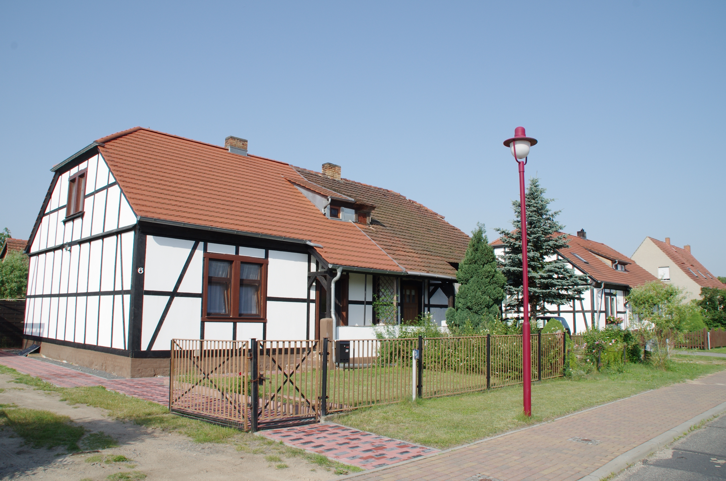 Luckau in Brandenburg. Das Haus steht unter Denkmalschutz.